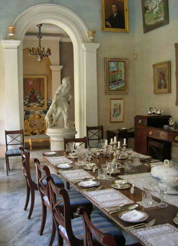 קאזה רוקה פיקולה